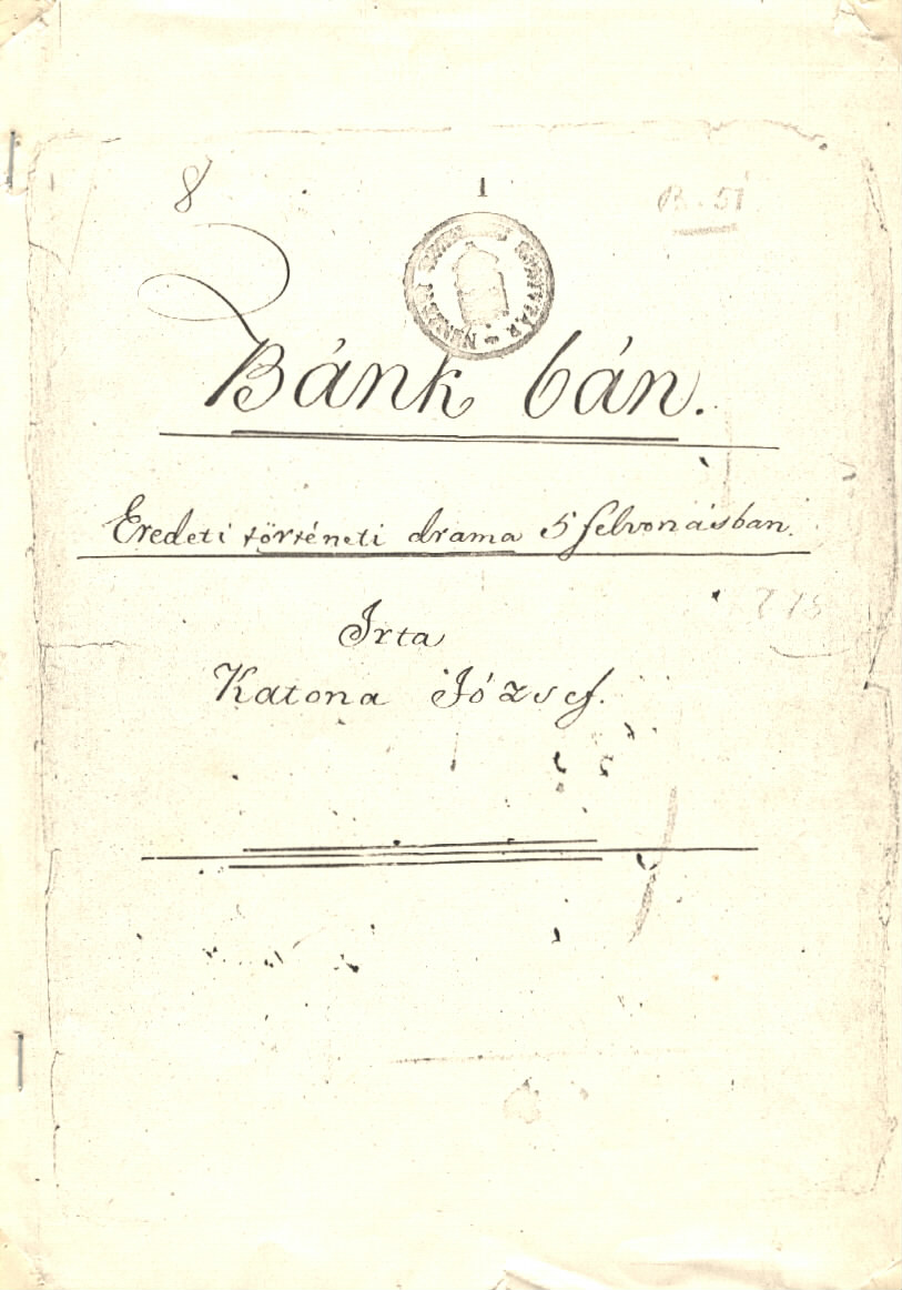 A Bánk bán kéziratos címlapja